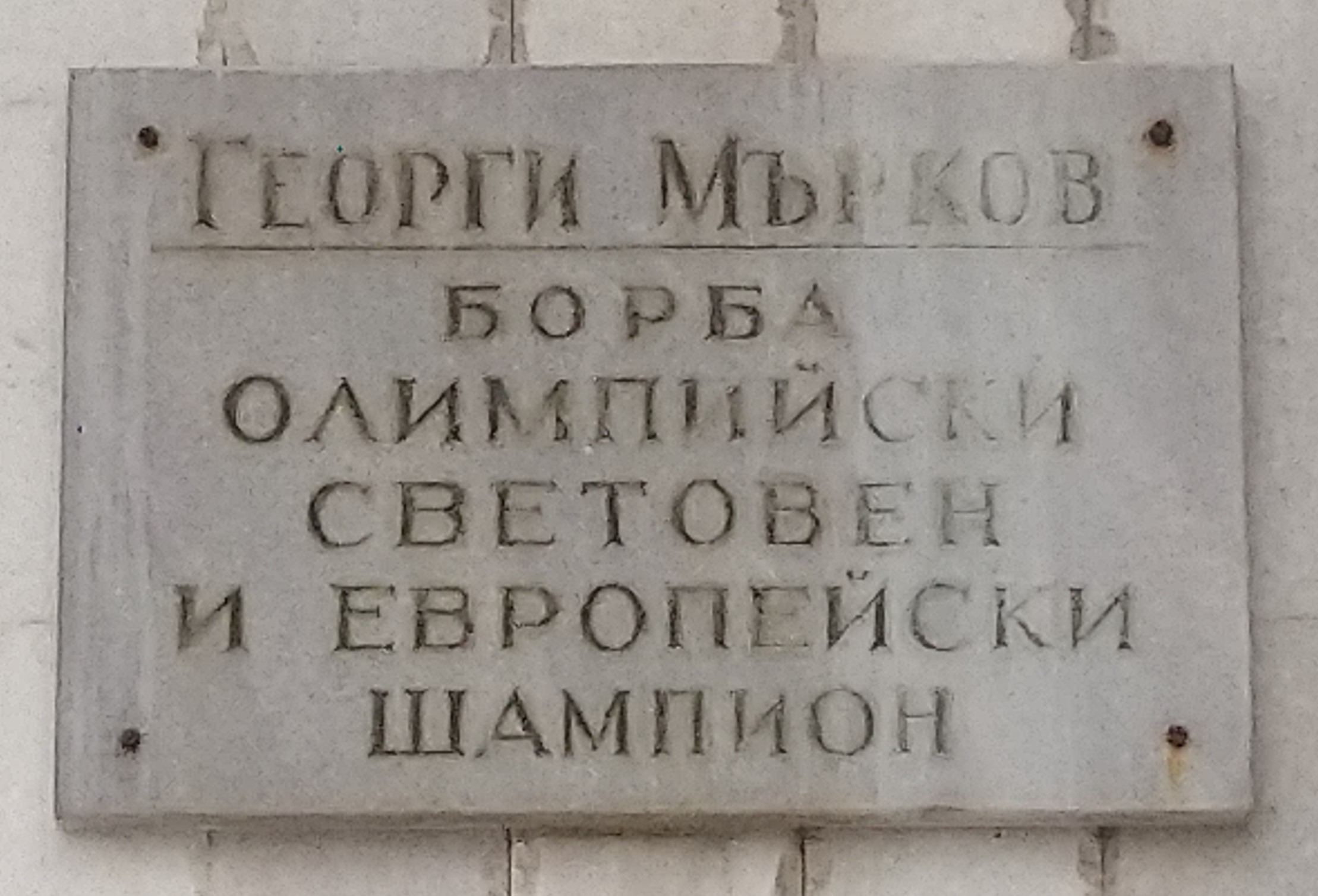 Паметна плоча на спортиста Георги Мърков (борба) на фасадата на спортна зала "Васил Левски", Пазарджик